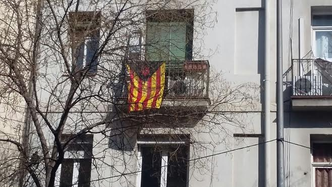 Estelada llibertària